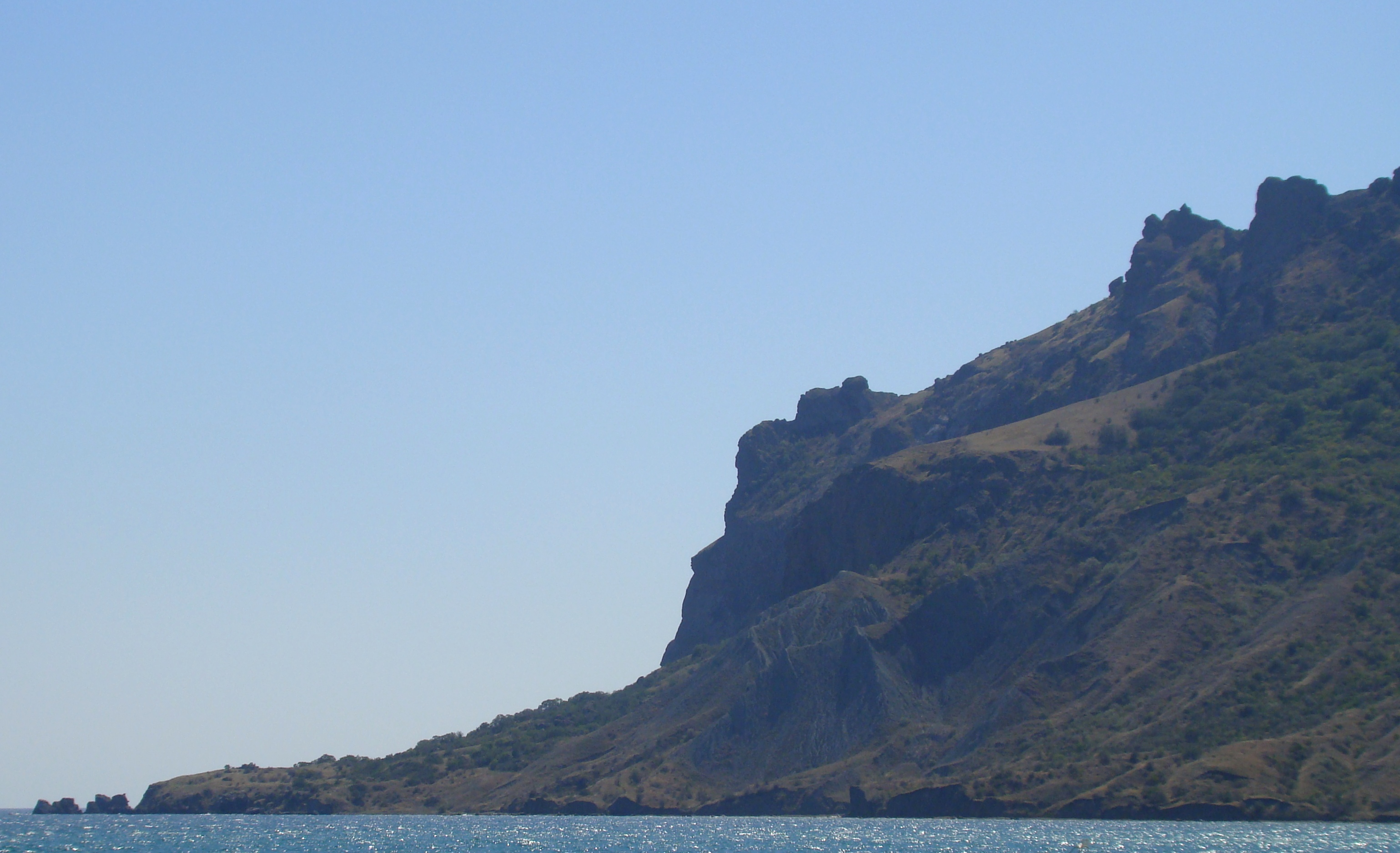 Гора "Профіль Волошина" в Коктебелі (Автономна Республіка Крим, Україна)